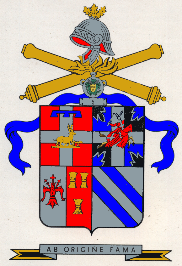 Stemma del 5º Rgt artiglieria (anno 1974)